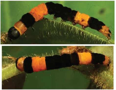 Ethmia normgershenzi